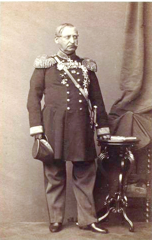 Kniaz' D.O. Bebutov, General- Leitenant